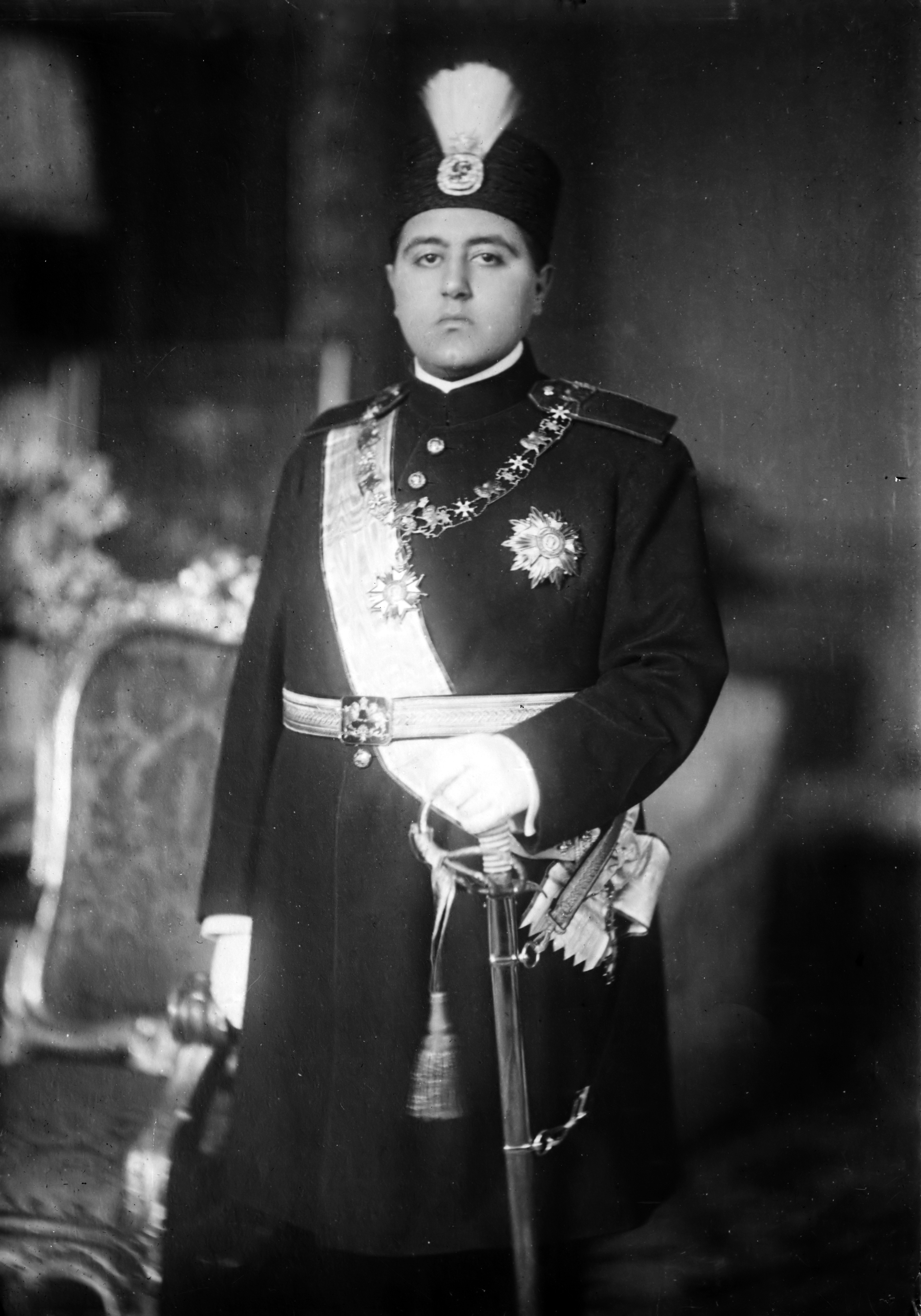 Ahmad Shāh Qājār, Shah of Iran, 1897 - 1929